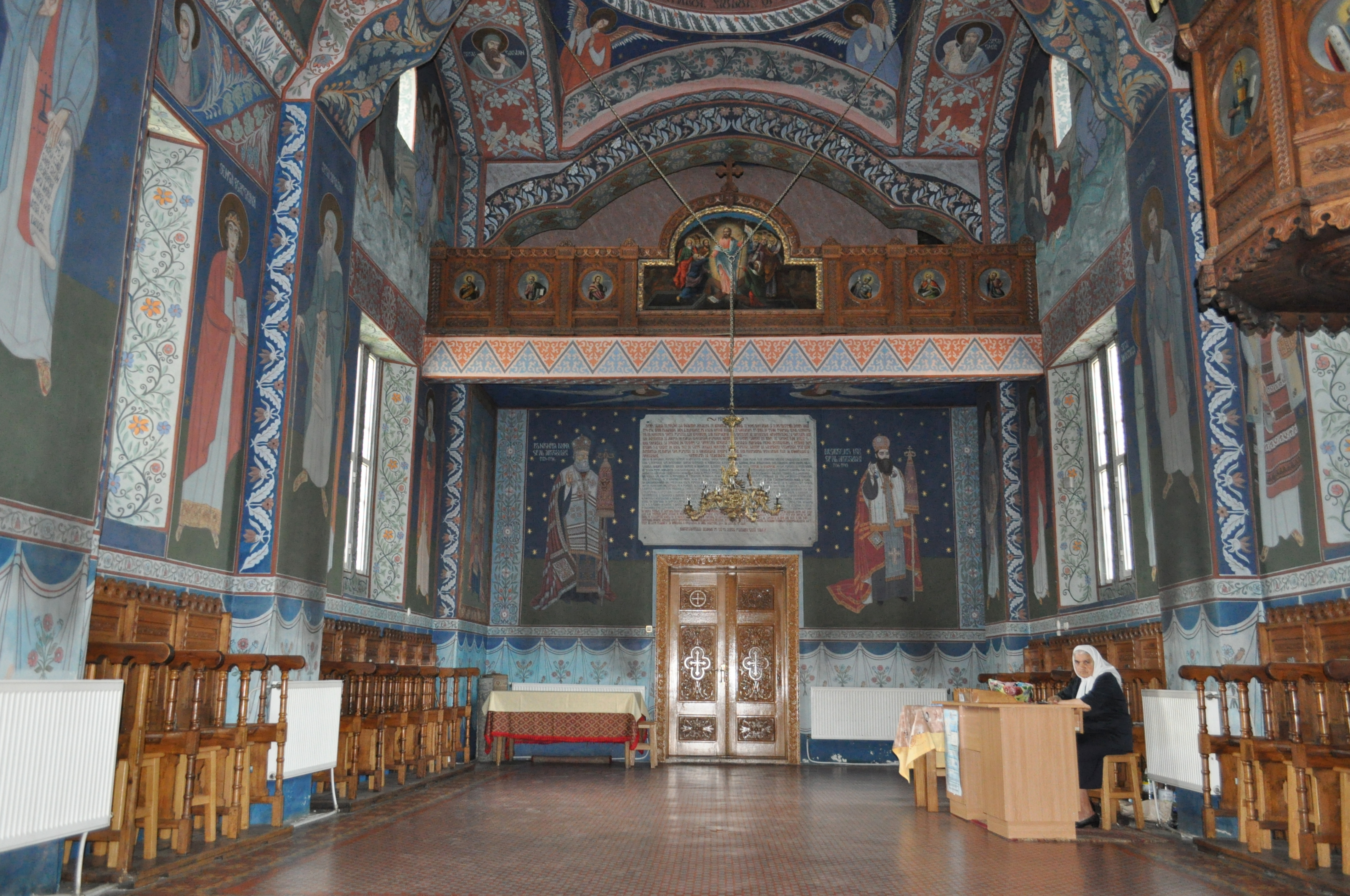 Biserica "Sf. Gheorghe", municipiul Curtea de Argeș, Bd. Basarabilor 91